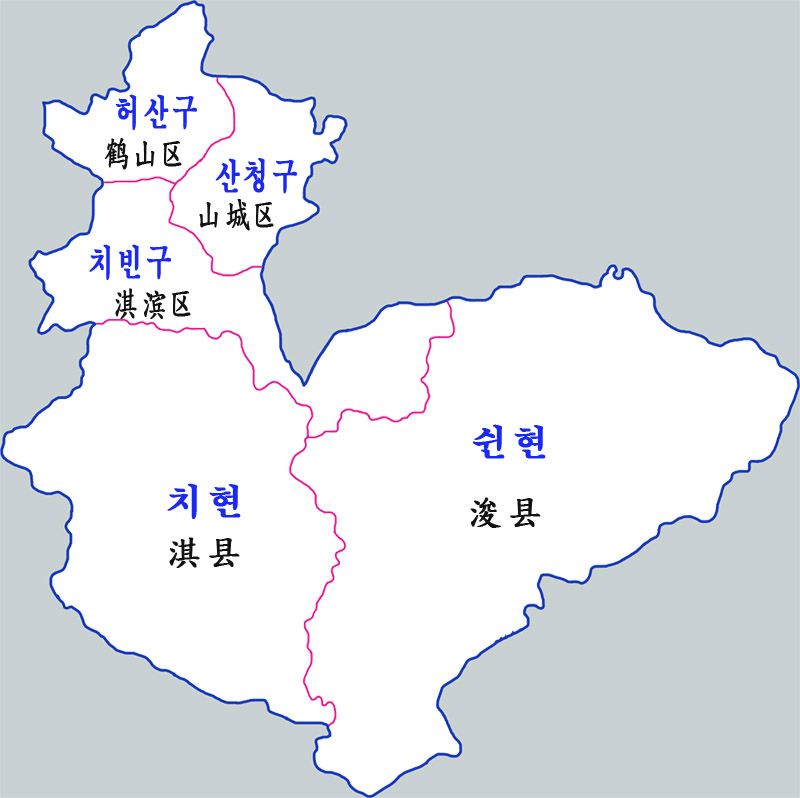 허비시 현급구역도